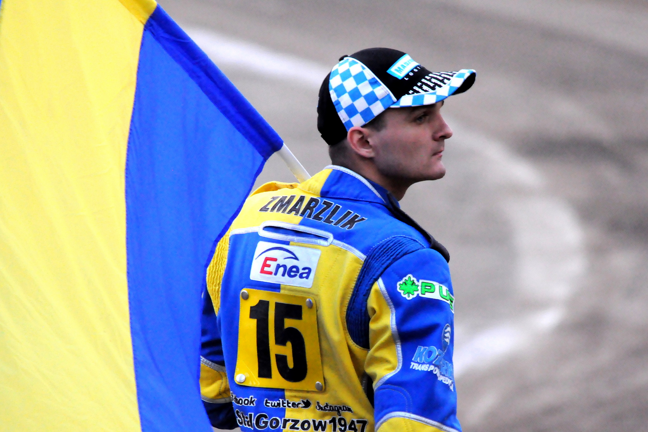 Bartosz Zmarzlik